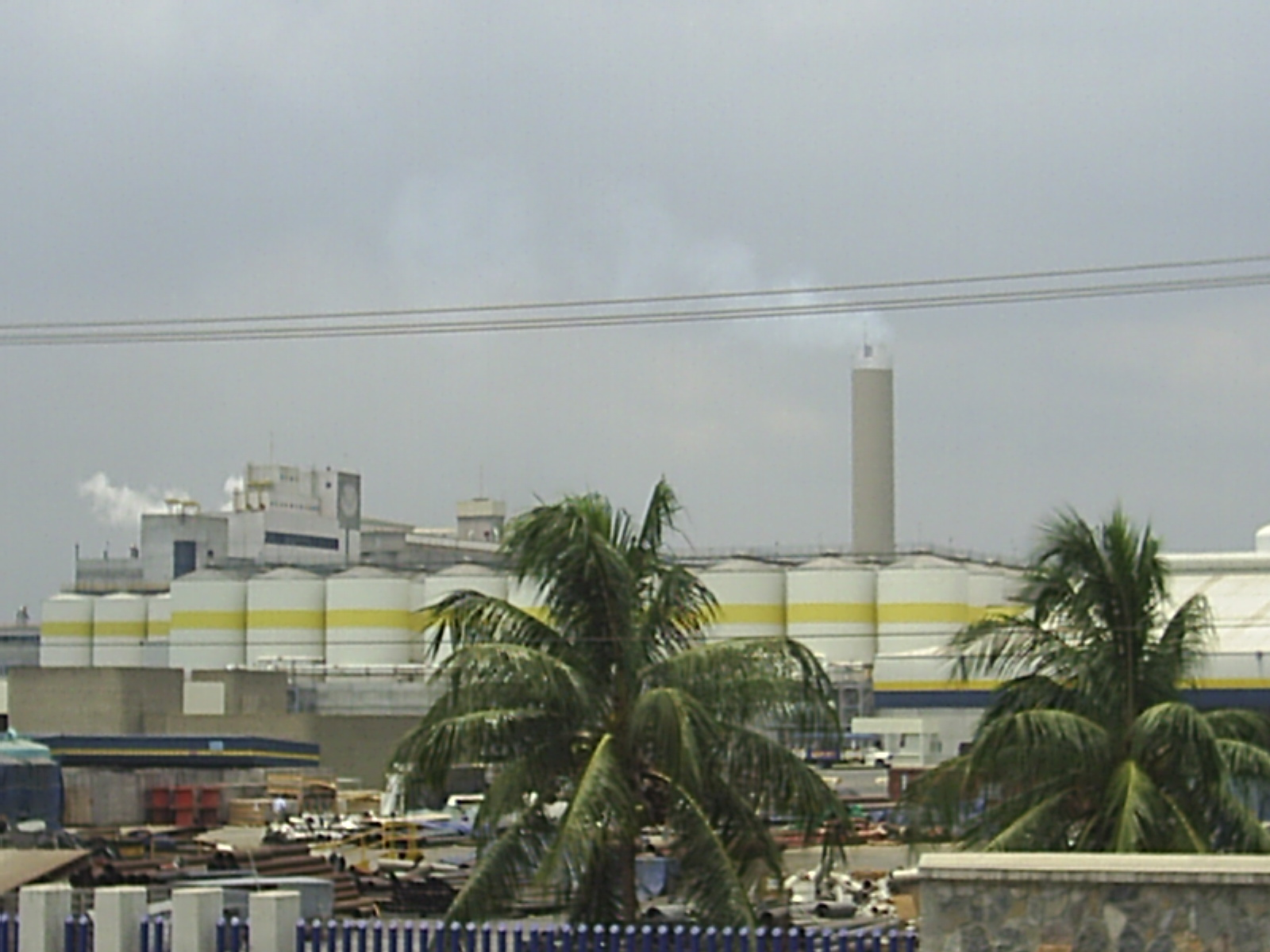 Imagen de La Cervecera de Tuxtepec, OAX.